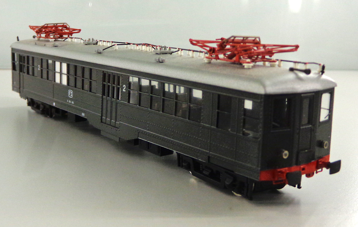 Modello in scala H0 di un'elettromotrice E.624 "Piacentina", realizzato dalla ditta Timishoara, esposto alla fiera di modellismo "Hobby Model Expo" del 2013, nello stand del Gruppo Modellisti Romani.